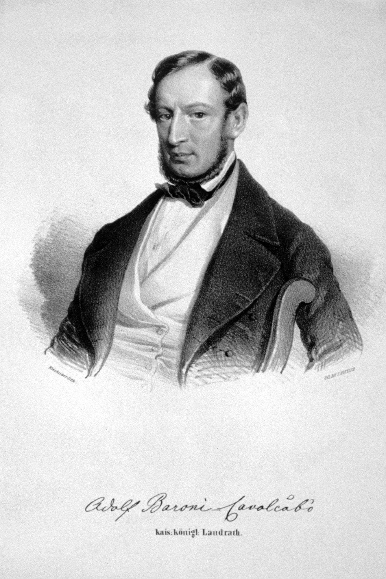 Adolf von Baroni-Cavalcabò, k. k. Beamter. Lithographie von Josef Kriehuber, um 1840